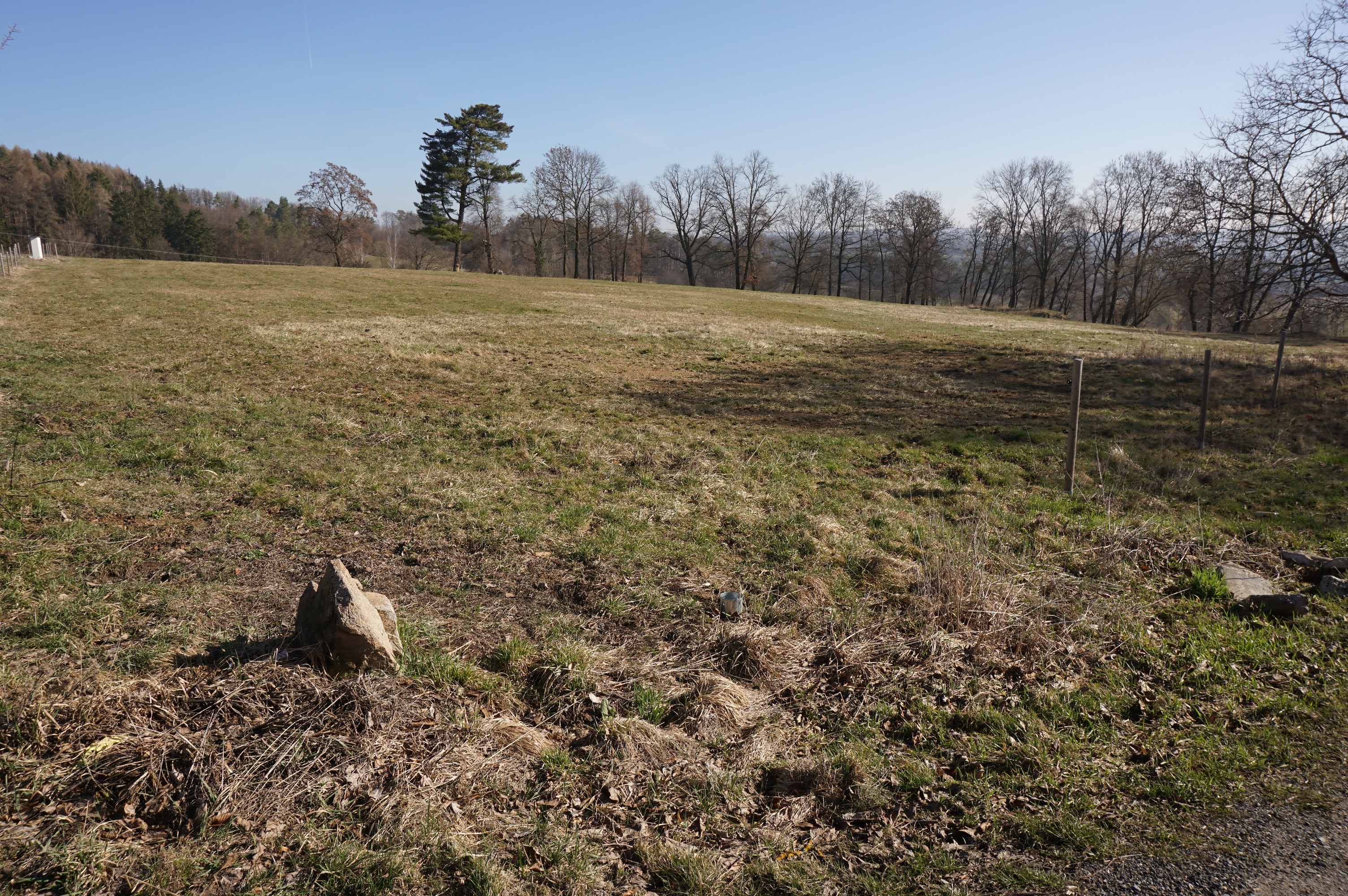 místo bývalého zámku Chlum u Dolní Lomnice